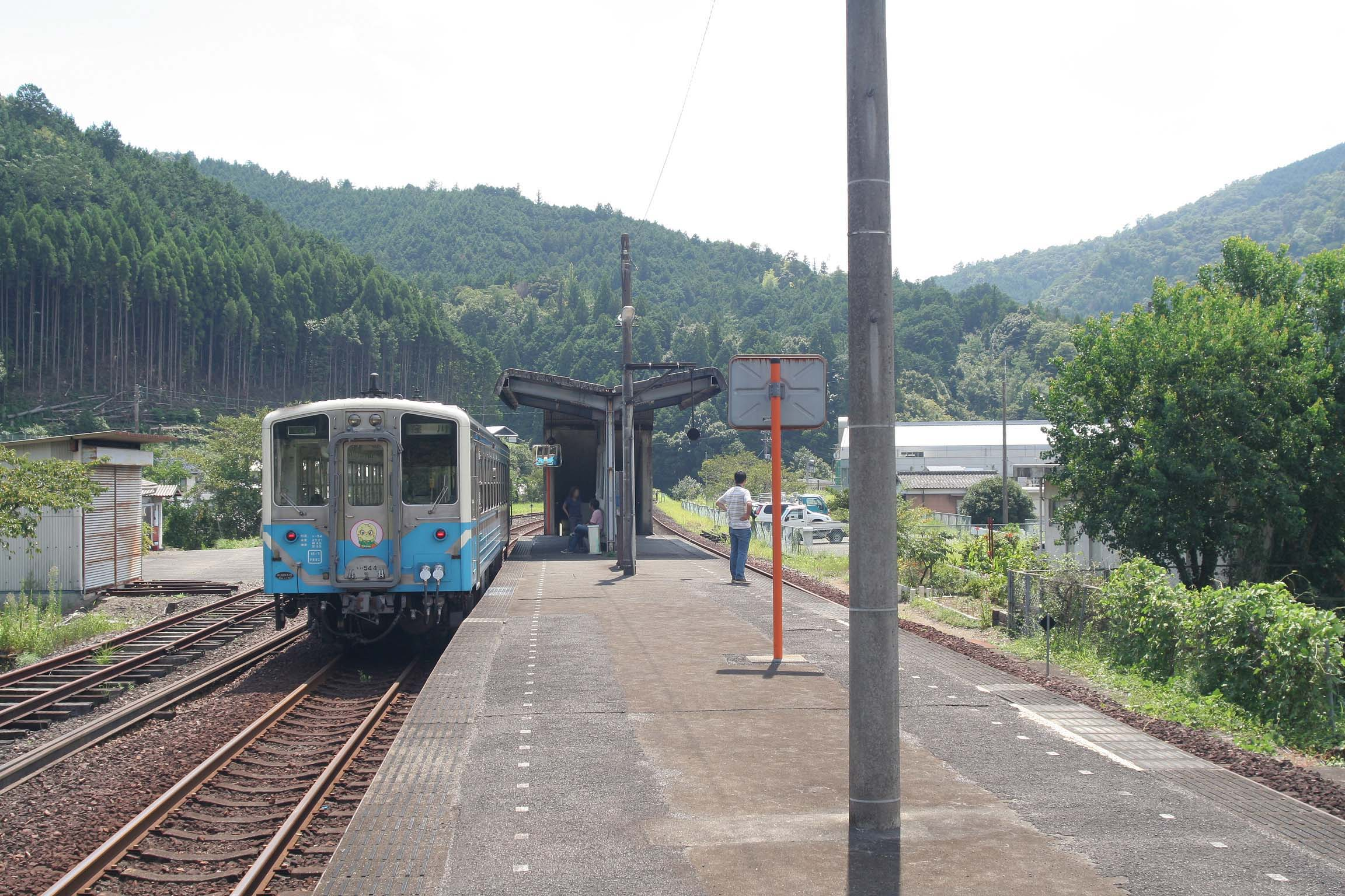 JR四国、土佐大正駅の構内の様子